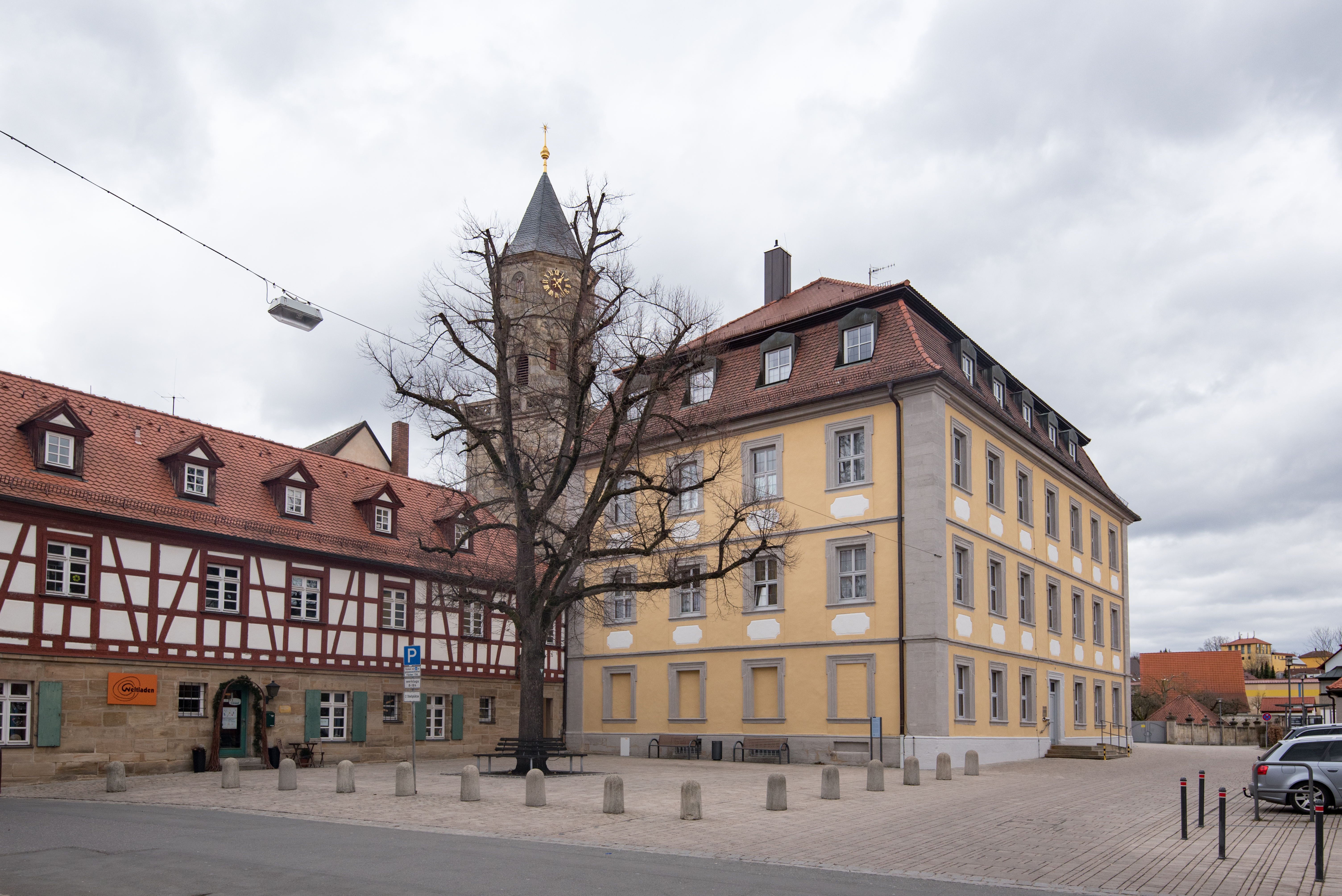 Neunkirchen am Brand, Mühlweg 1